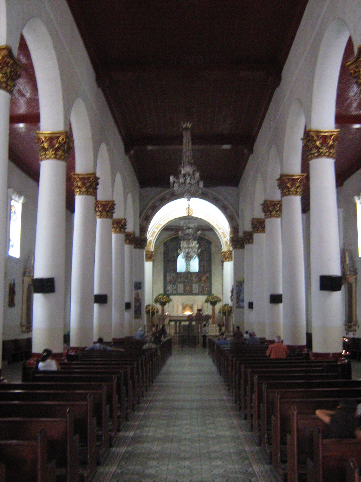 Nave central de la Iglesia Nuestra Señora del Rosario en el municipio de Itagüí, Colombia